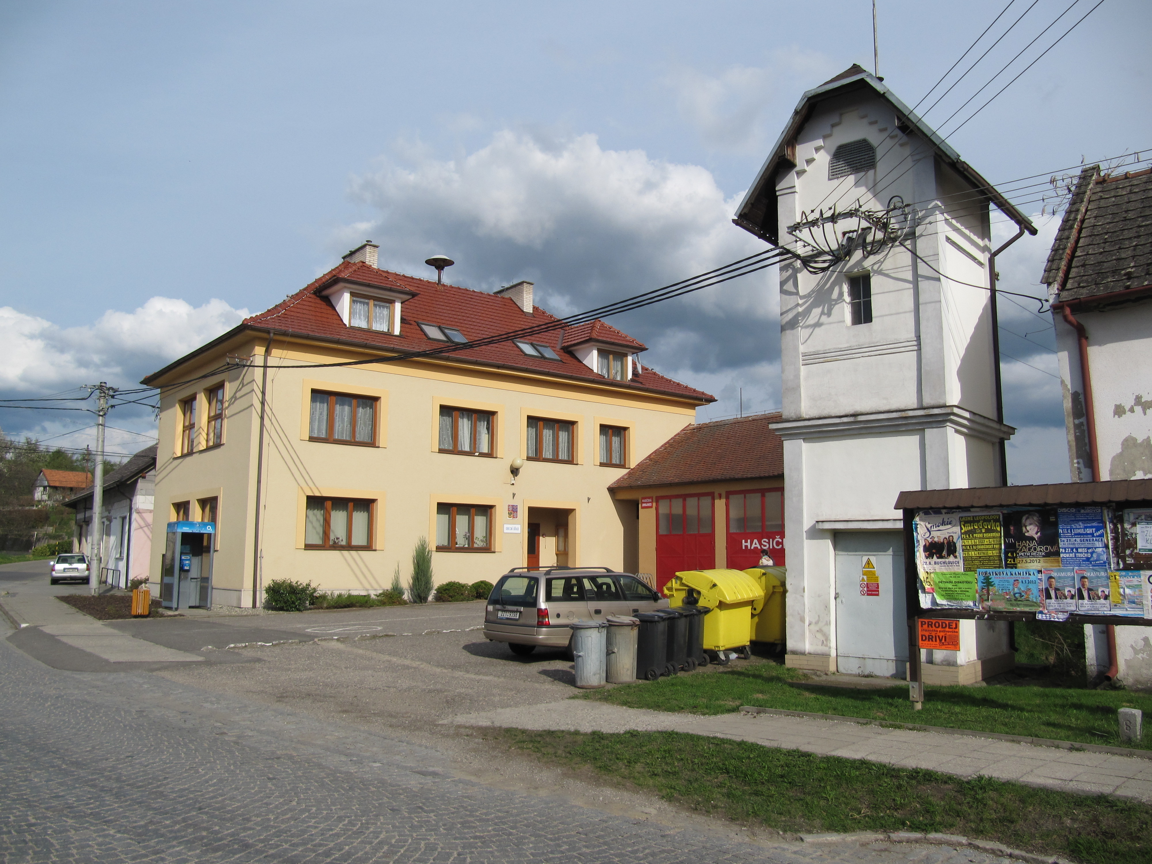 Kudlovice